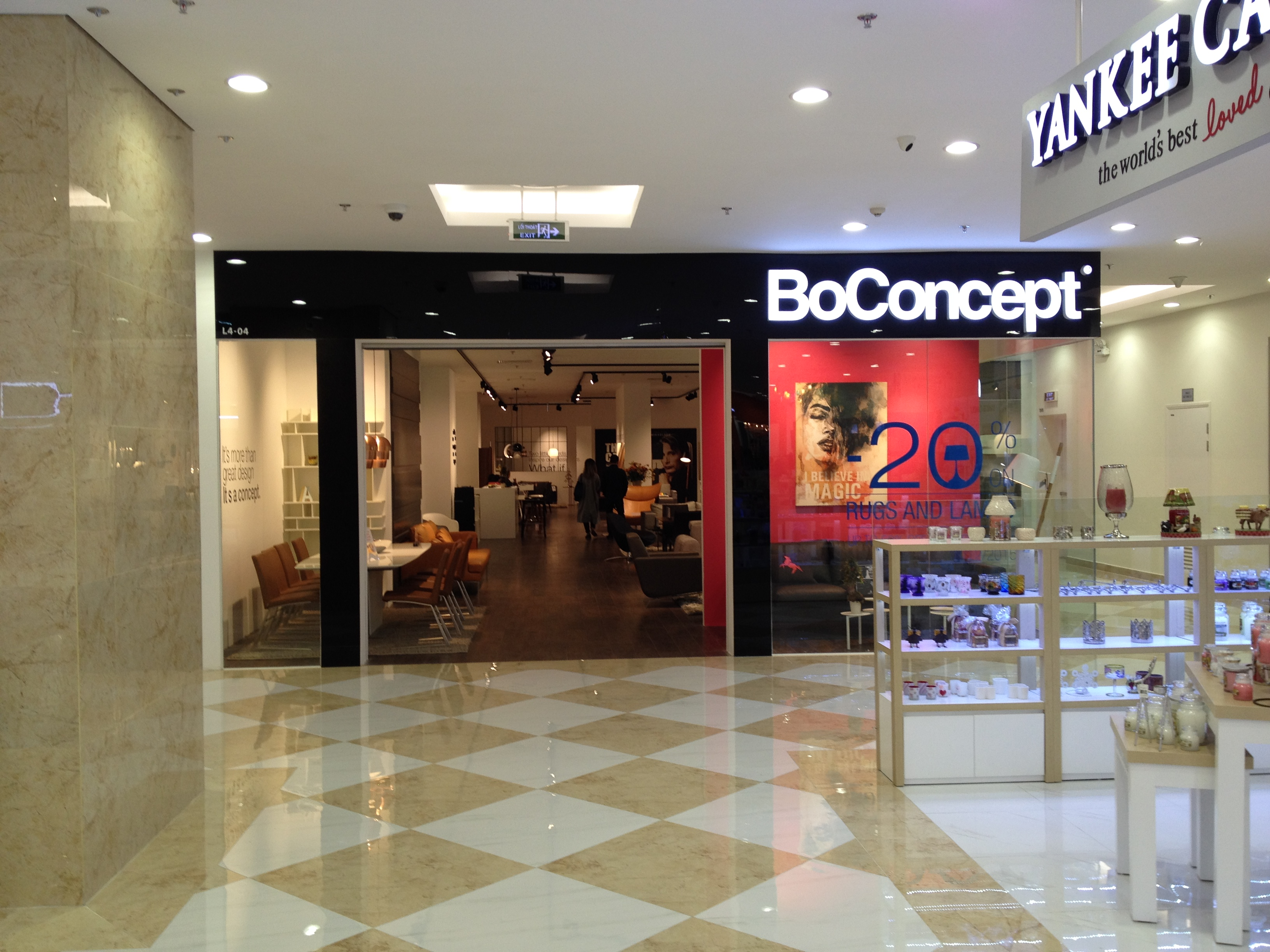 Vincom Nguyễn Chí Thanh, Hà Nội, Việt Nam.